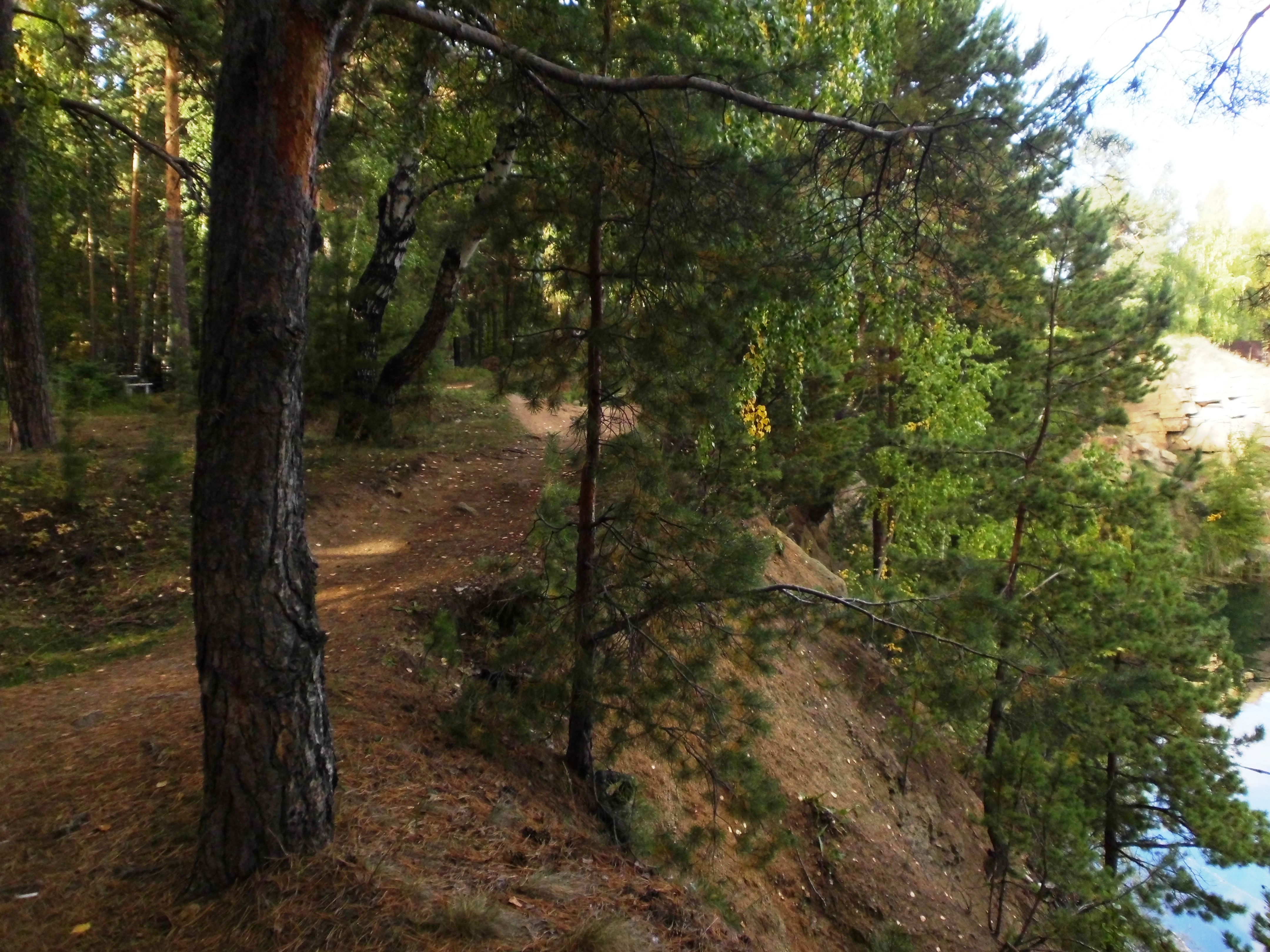 Слева могилы кладбища, справа обрыв Голубого карьера.